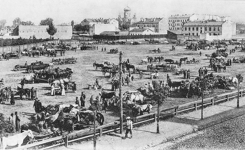 Targ koński na Pradze, widok od strony obecnej ulicy Kępnej